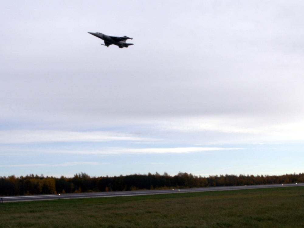 Mirage Zokniuose